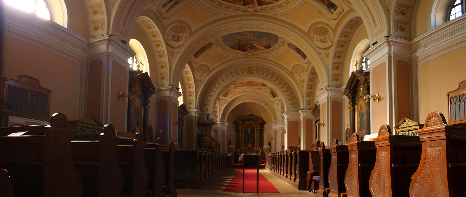 Római katolikus plébániatemplom (Cegléd, Kossuth Lajos tér)